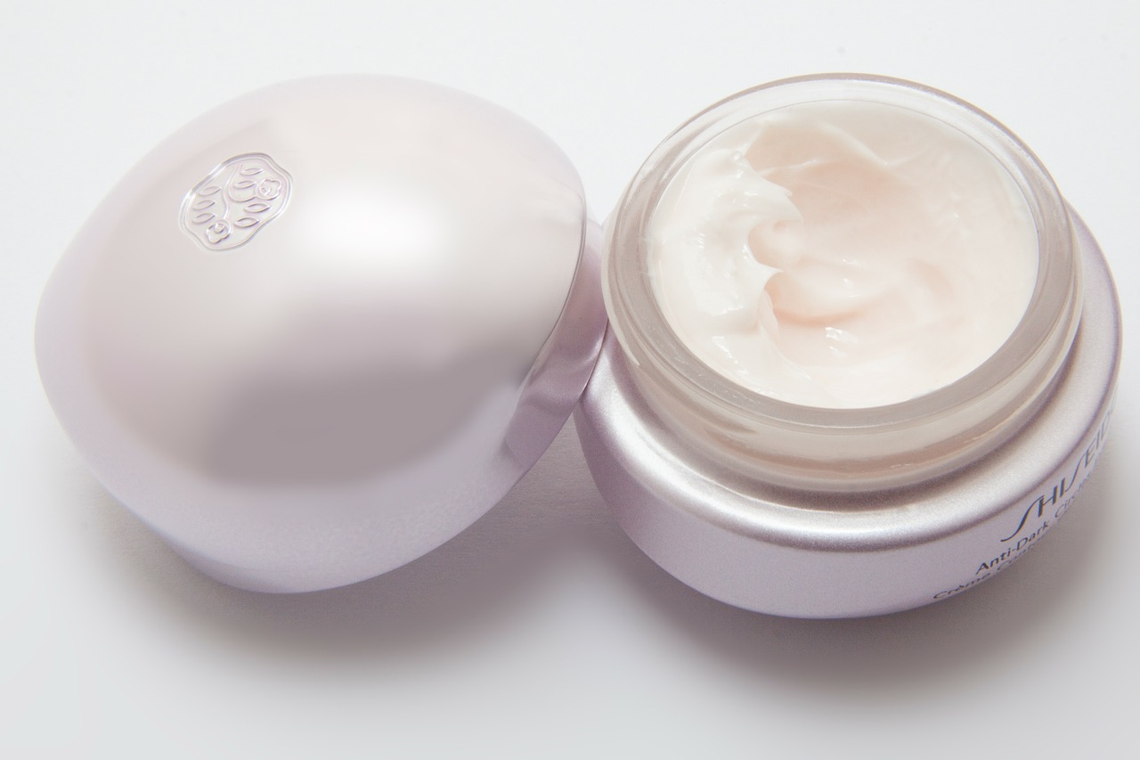 丸い容器に入った化粧用クリーム